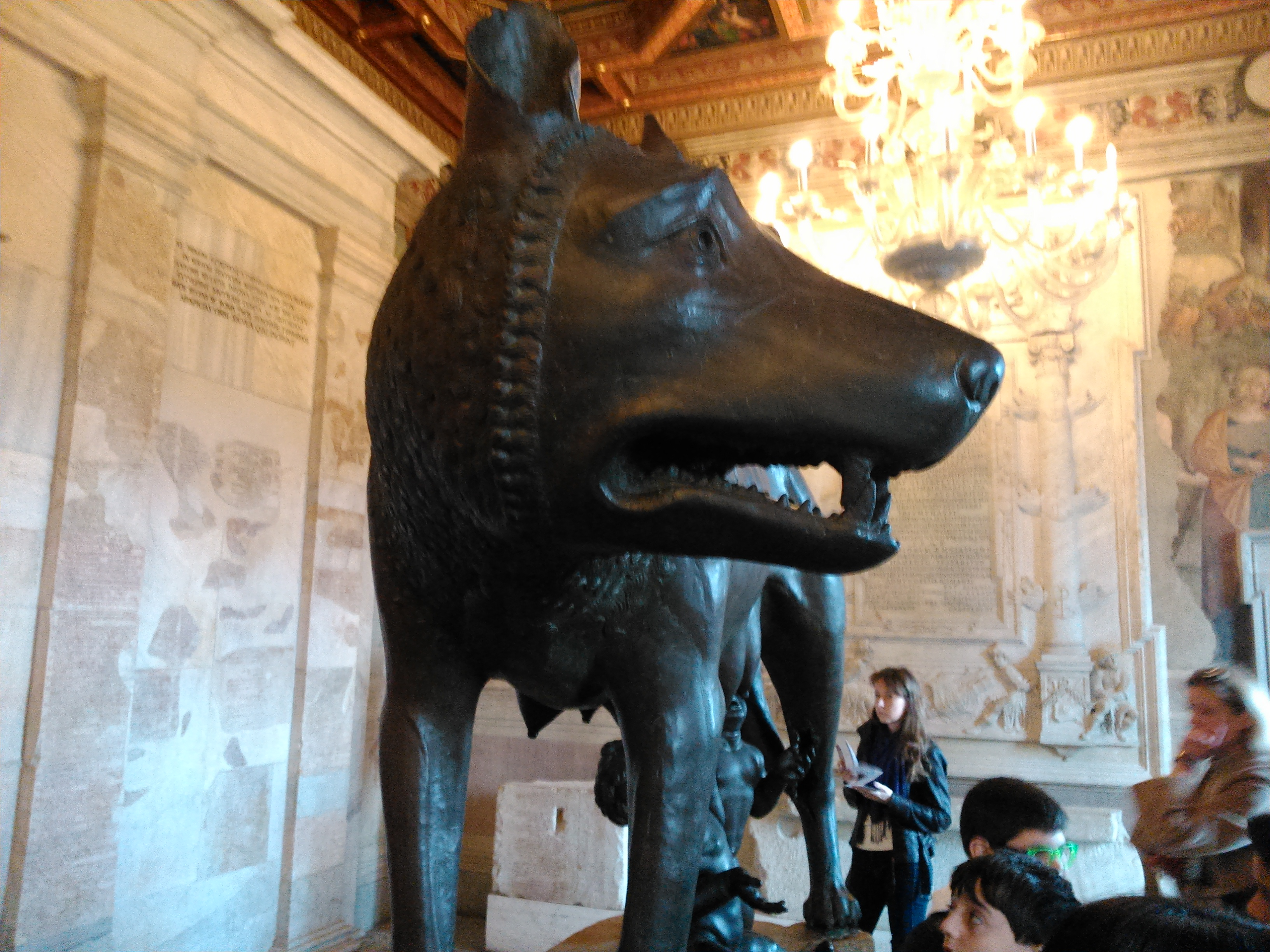 Lupa Capitolina (particolare)